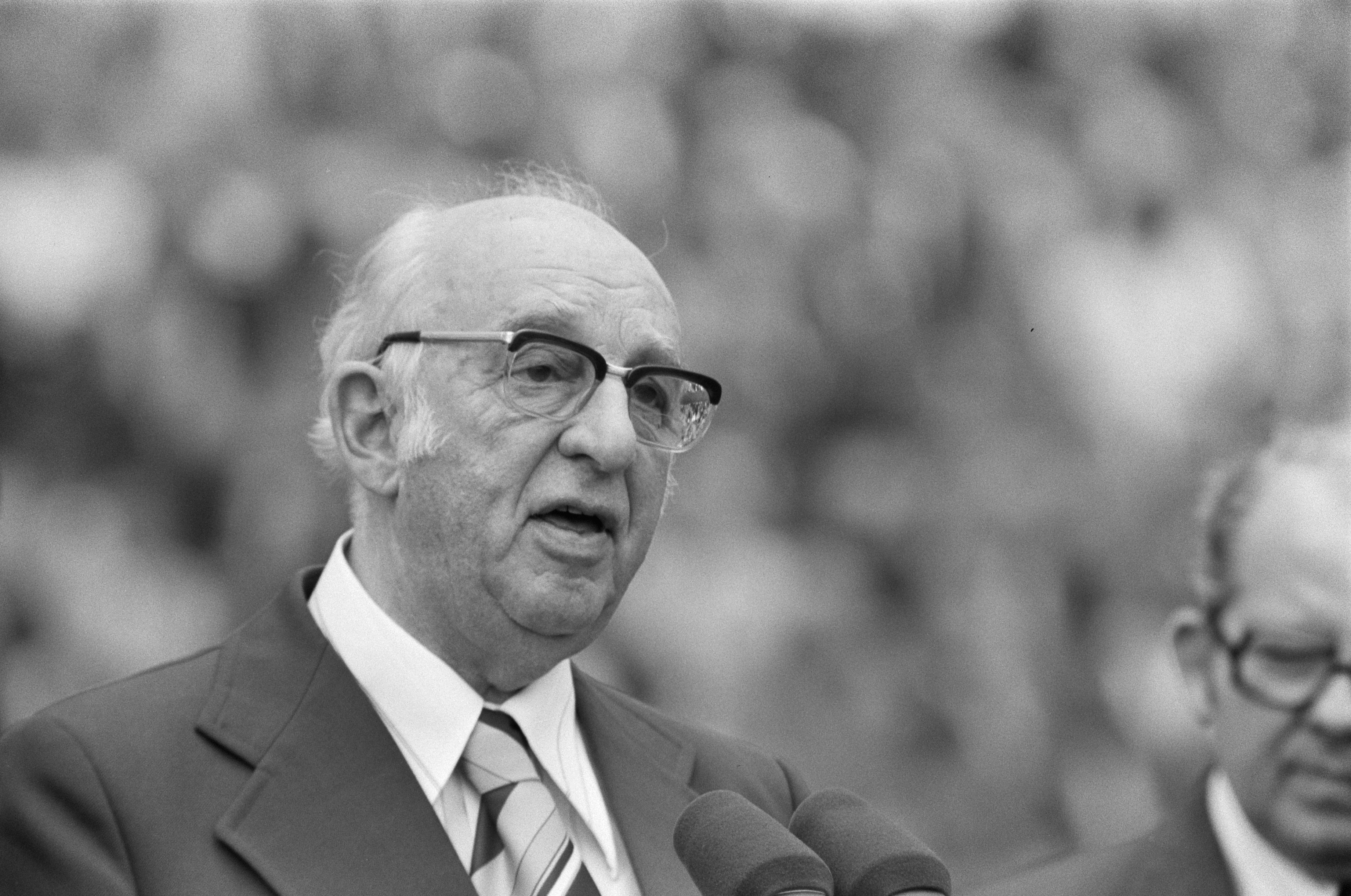 Collectie / Archief : Fotocollectie Anefo Reportage / Serie : [ onbekend ] Beschrijving : Finale wereldkampioenschap voetbal 1974 in Munchen, West Duitsland tegen Nederland 2-1; ? Datum : 7 juli 1974 Locatie : München, Nederland, West-Duitsland Trefwoorden : finales, sport, voetbal, wereldkampioenschappen Fotograaf : Verhoeff, Bert / Anefo Auteursrechthebbende : Nationaal Archief Materiaalsoort : Negatief (zwart/wit) Nummer archiefinventaris : bekijk toegang 2.24.01.05 Bestanddeelnummer : 927-3121